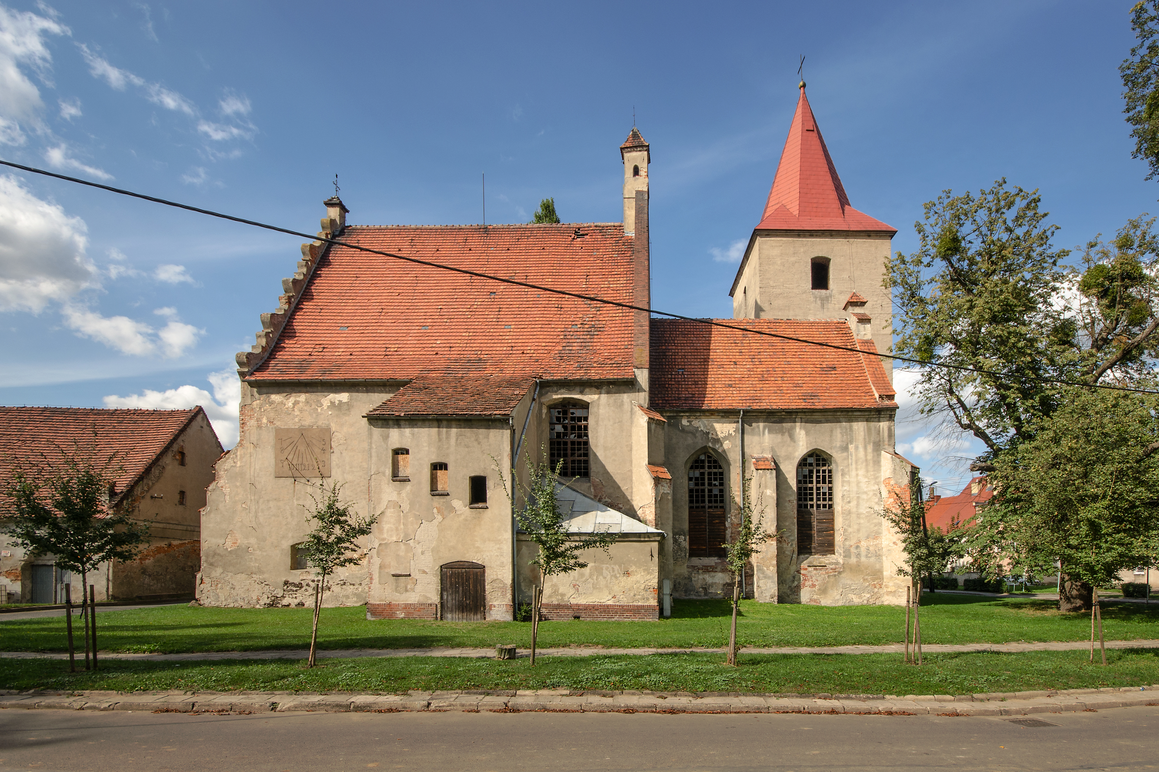 Lewin Brzeski, kościół ewangelicki p.w. śś Piotra i Pawła, XVI, 1660